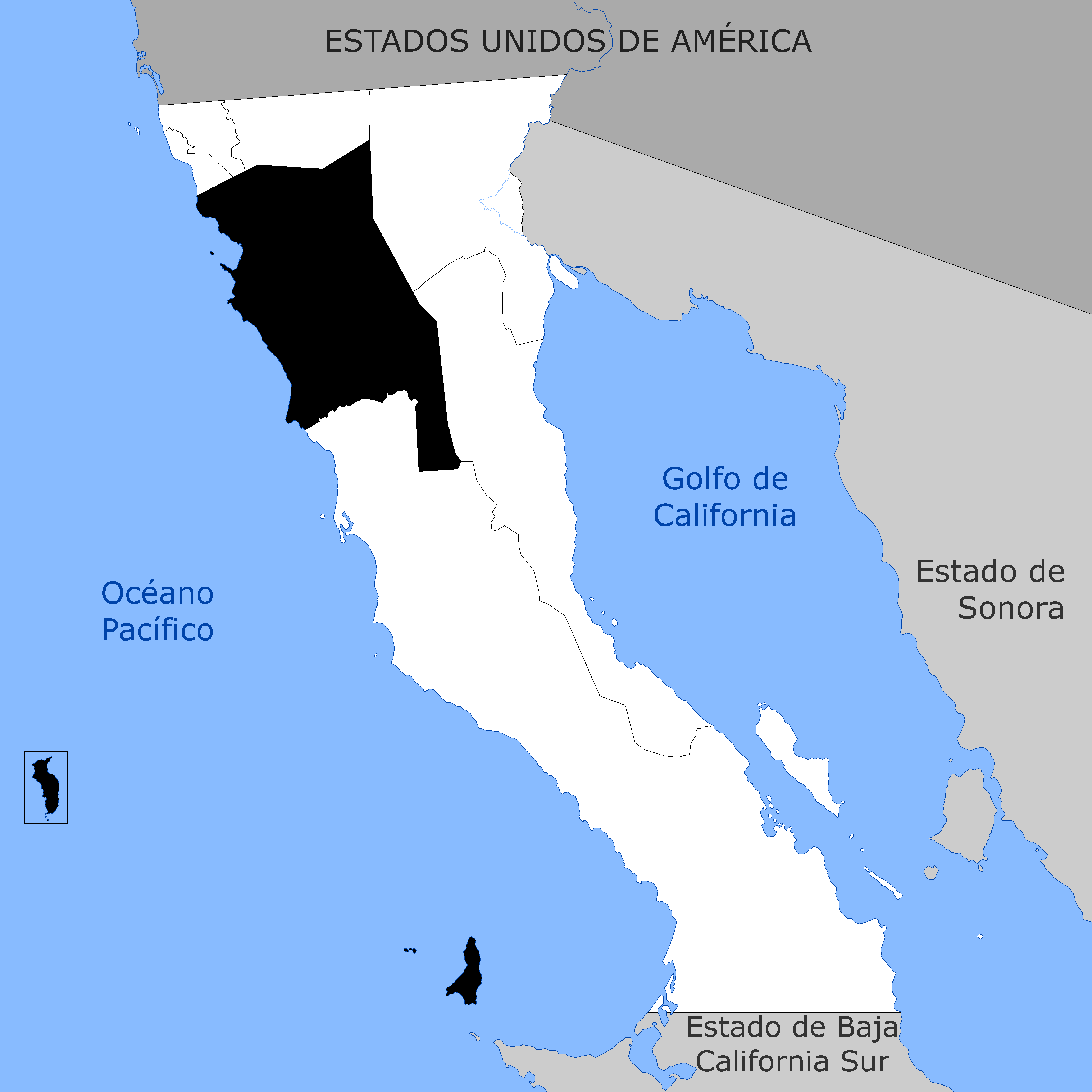 Nuevo mapa de Ensenada tras la separación de San Quintín